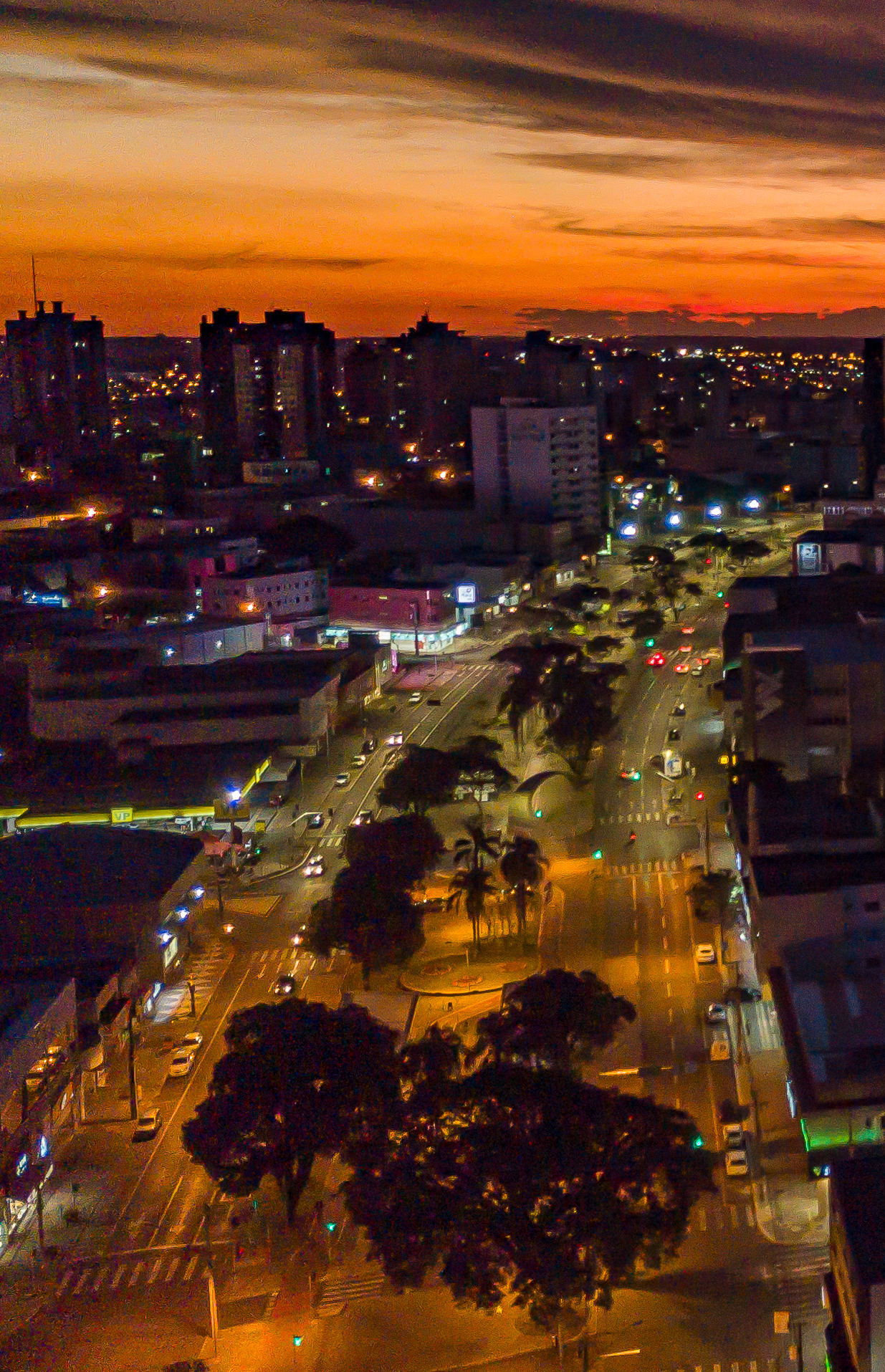 Fotos do Centro de Cascavel-PR a noite fotos com Drone por Fabio Covaleski